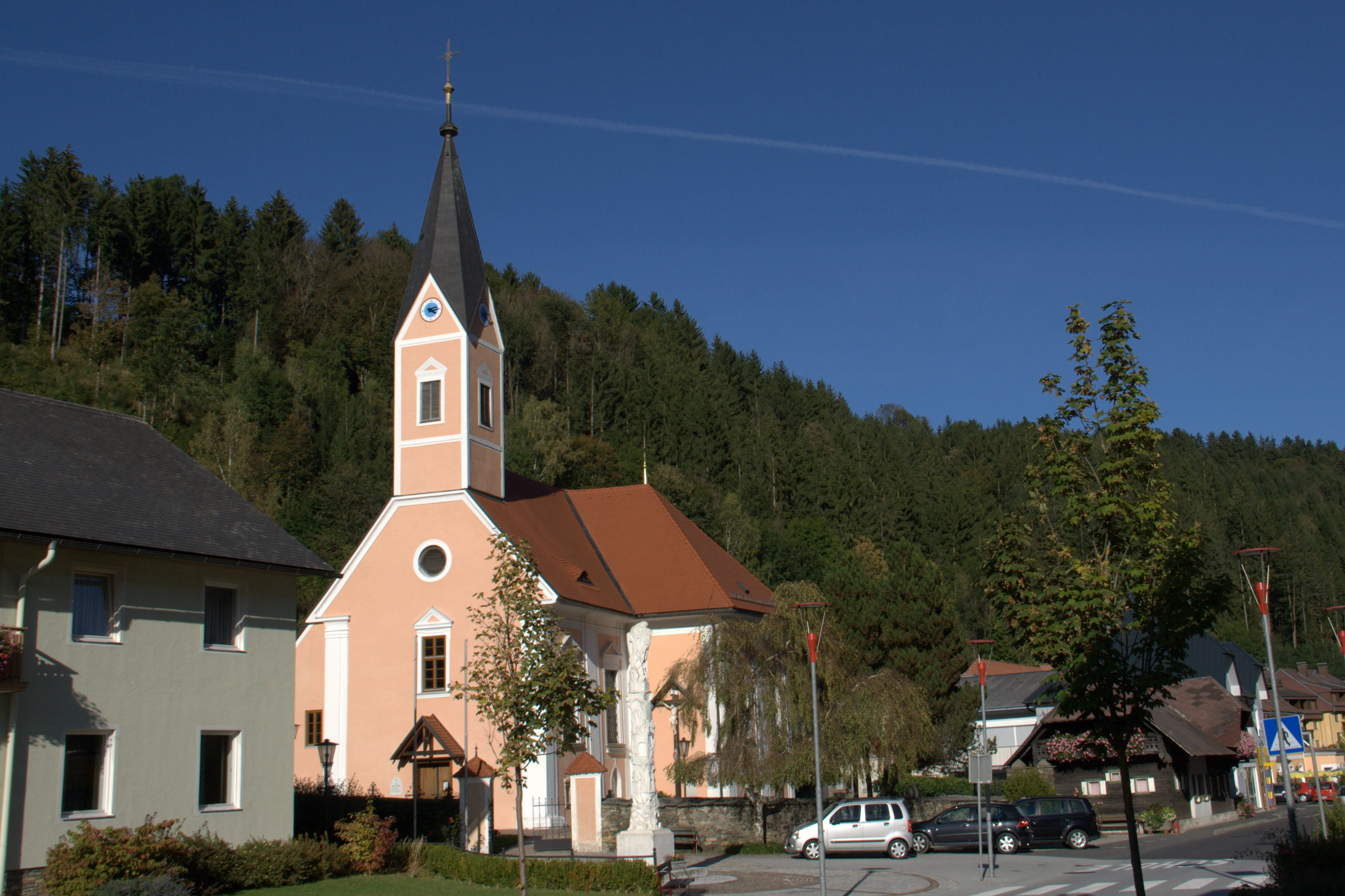 Kath. Pfarrkirche hl. Georg und Kirchhofmauer mit Nischenkapelle